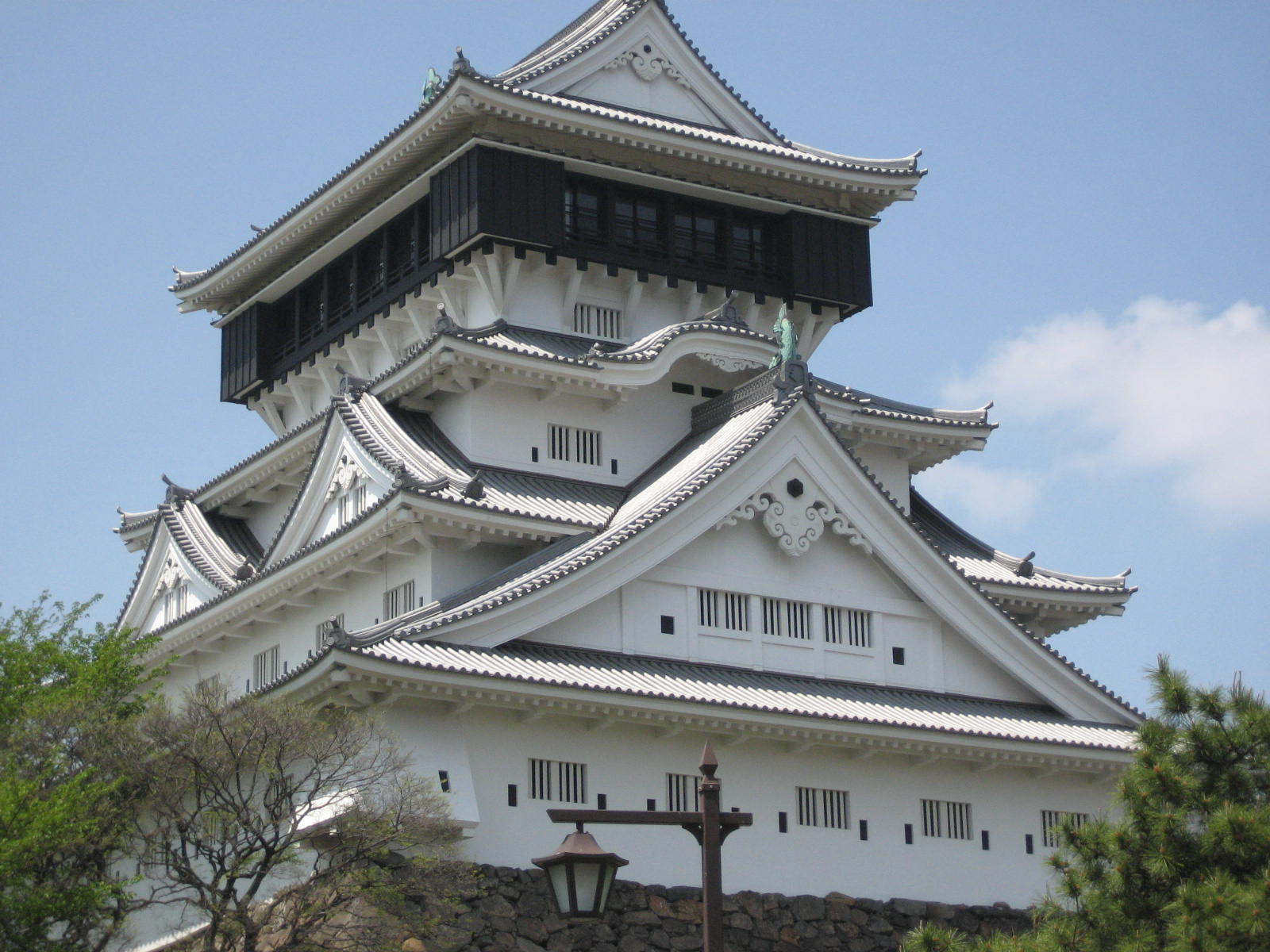 Kokura castle, Kitakyushu Japan